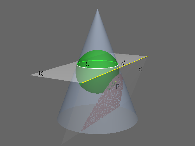 Conic Section (Parabola)